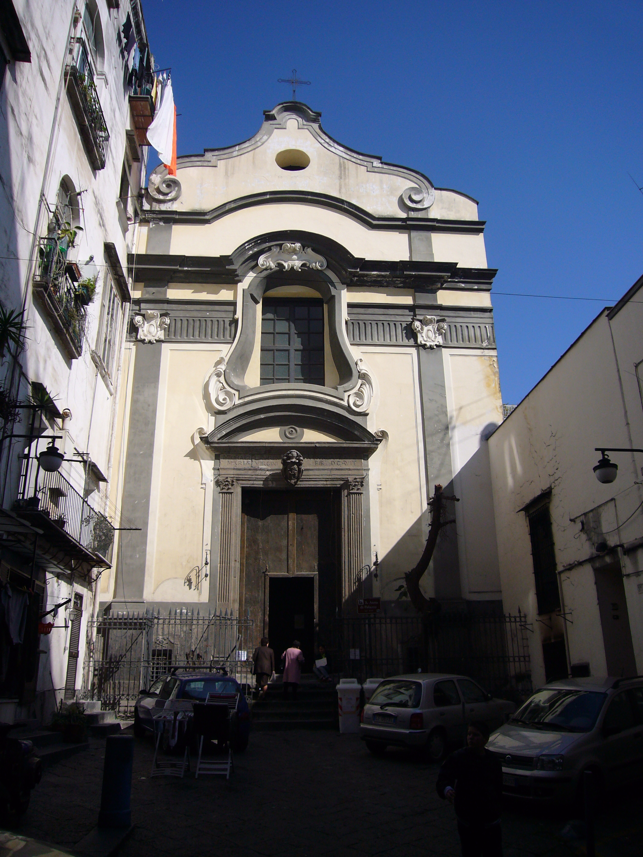 Napoli, Sant'Anna di Palazzo - facciata